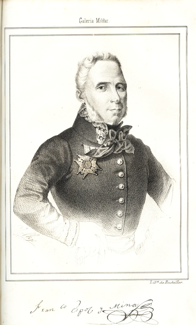 Francisco Espoz y Mina. "Galería Militar Contemporánea". Madrid 1846